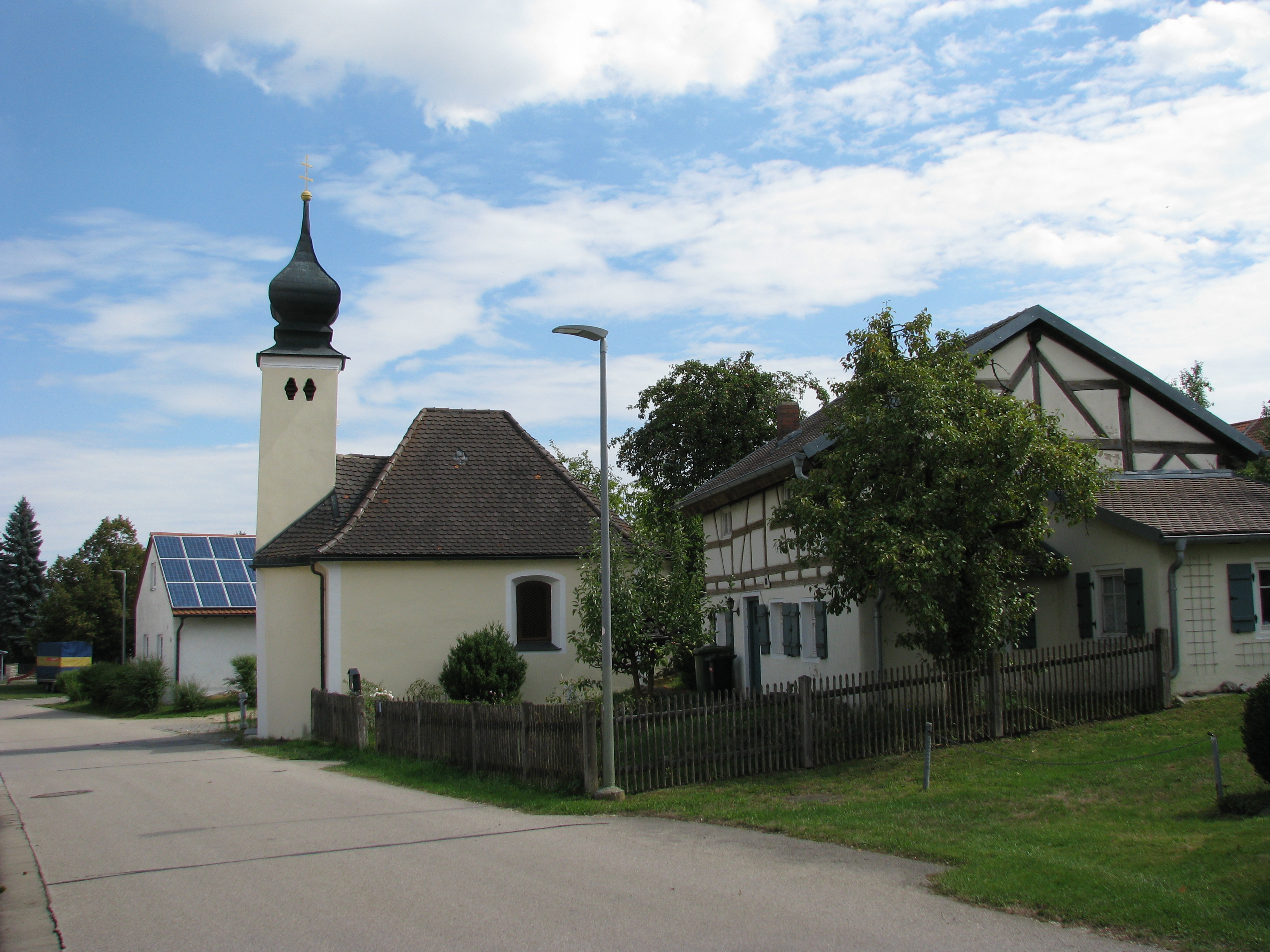 Dorfmitte von Grampersdorf, Gemeindeteil von Beilngries im Landkreis Eichstätt